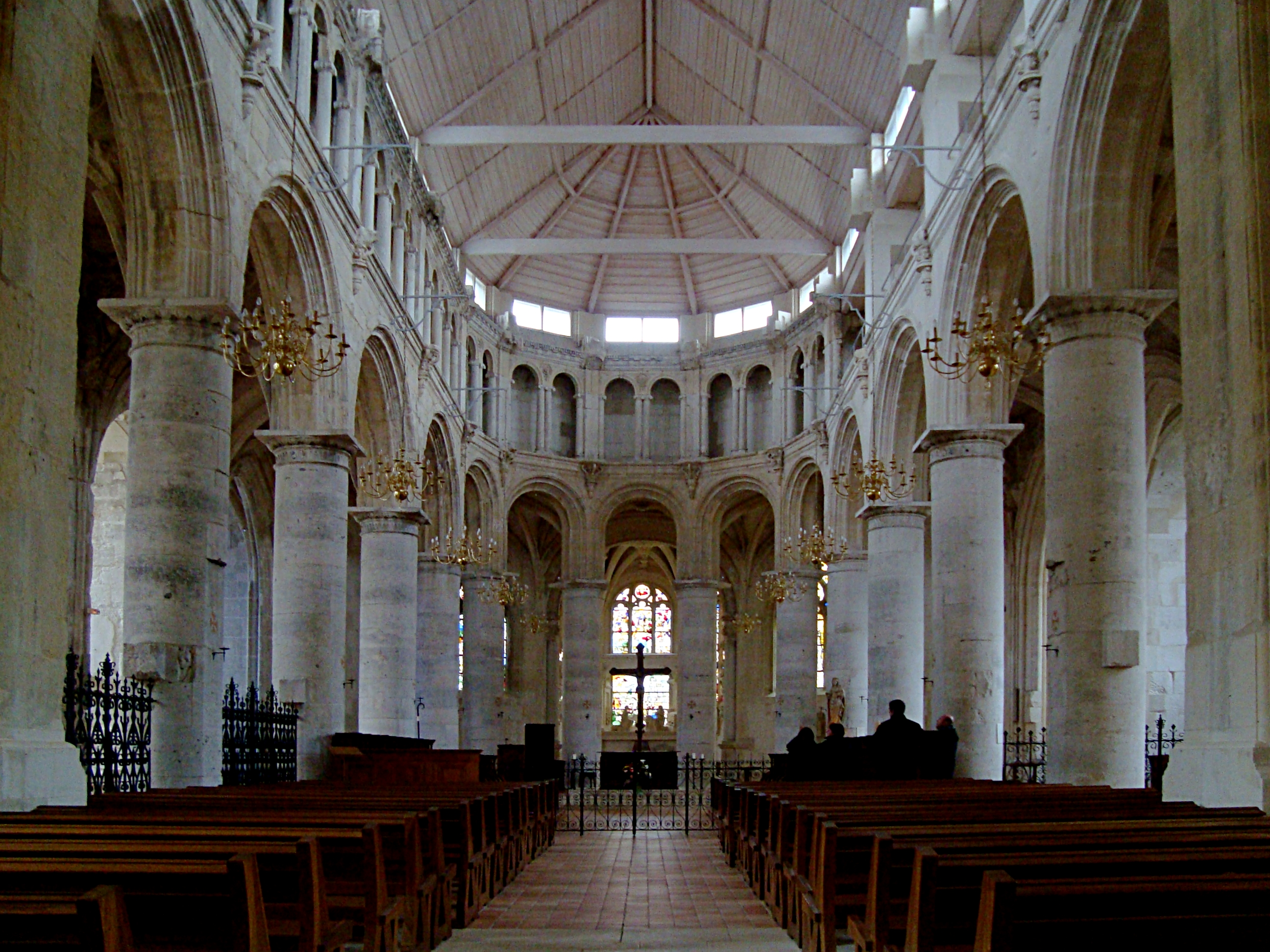 Vue intérieure de la chapelle de l'abbaye Notre-Dame du Pré à Valmont (Seine-Maritime).